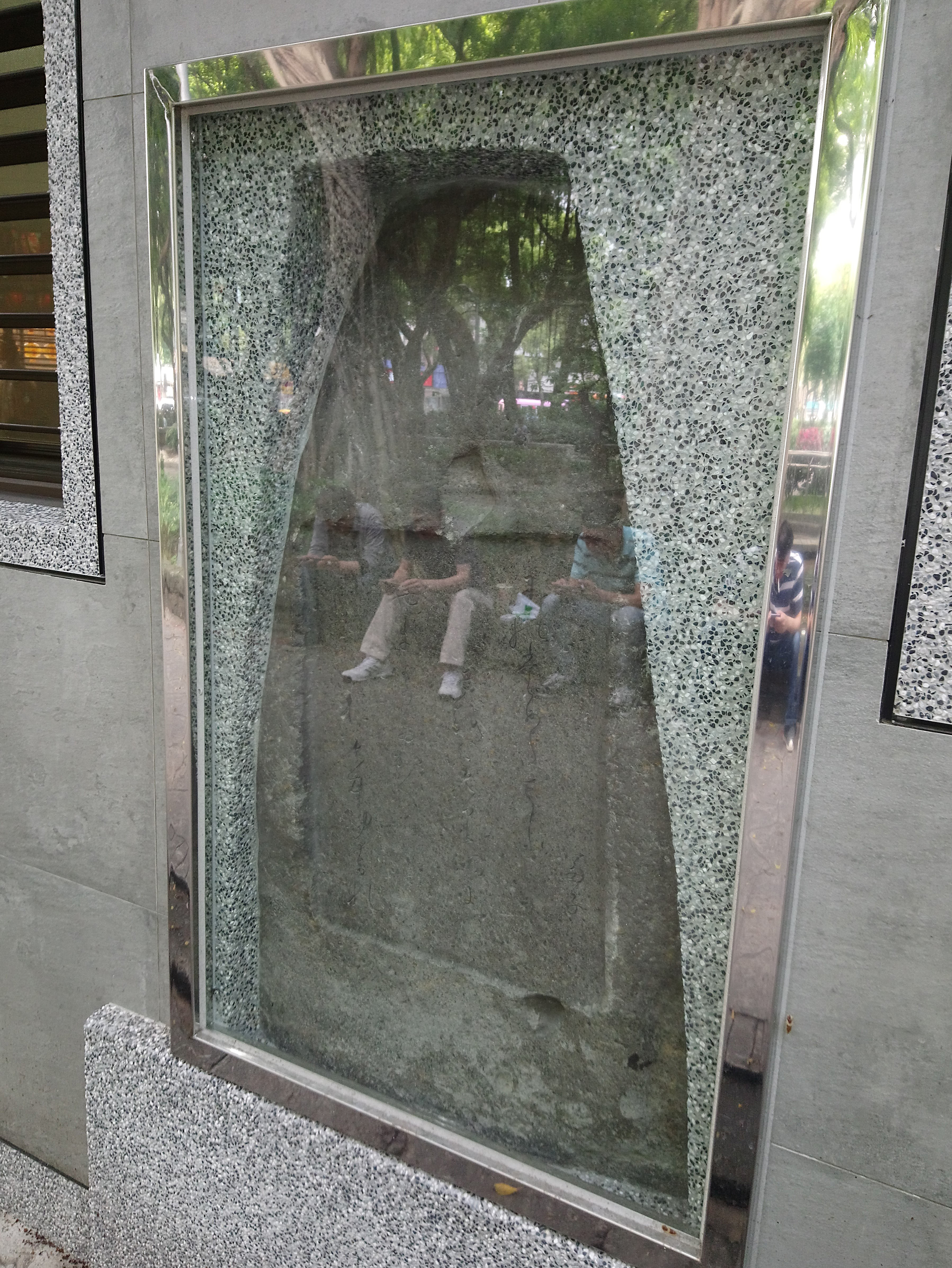 北白川宮大妃殿下御歌碑,臺北市中正區南門次分區南福里